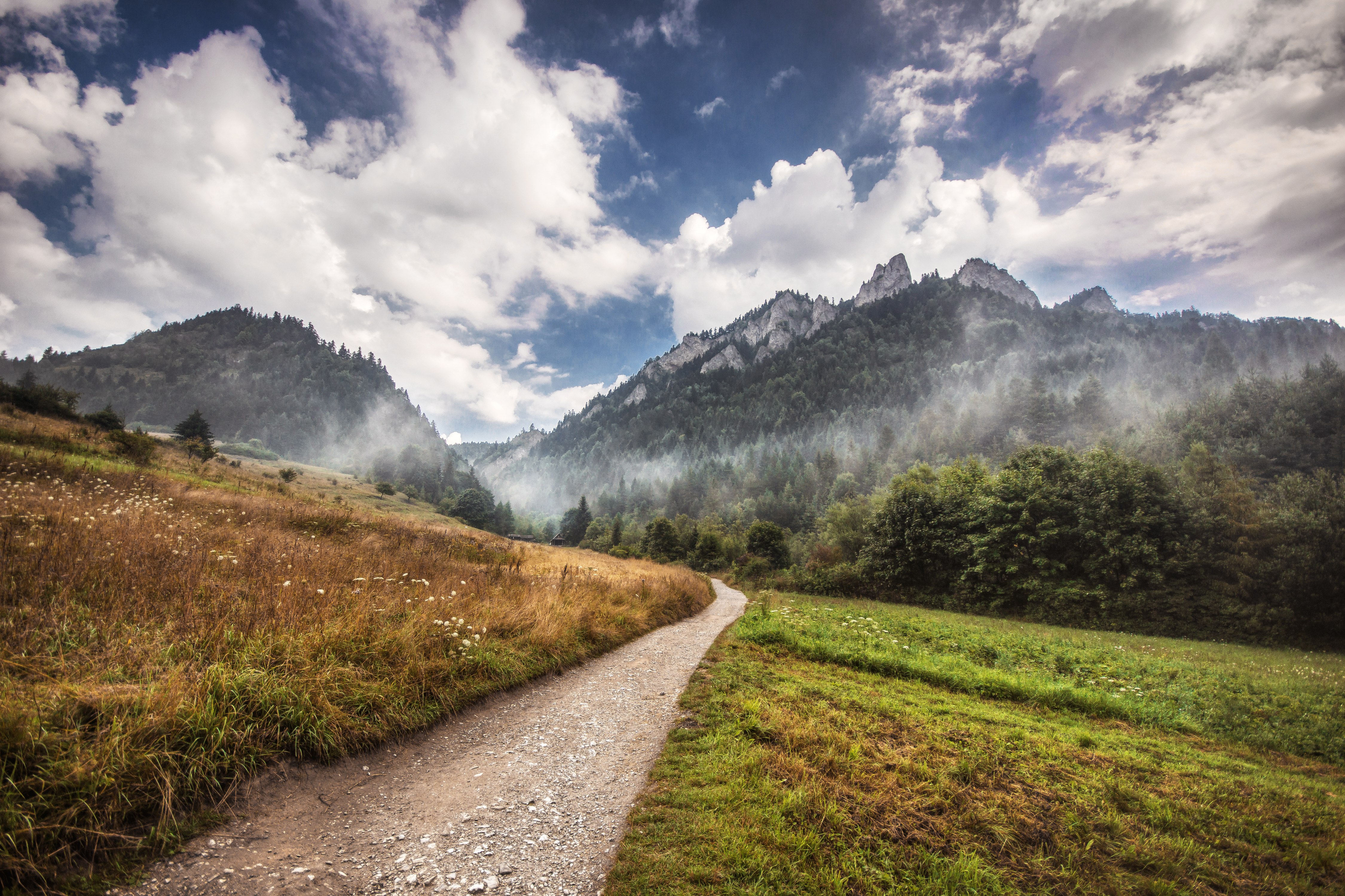 Obszar specjalnej ochrony ptaków: Pieniny Trzy Korony widok ze szlaku z okolic schroniska PTTK This is a photography of protected area with CRFOP ID PL.ZIPOP.1393.N2K.PLC120002.B